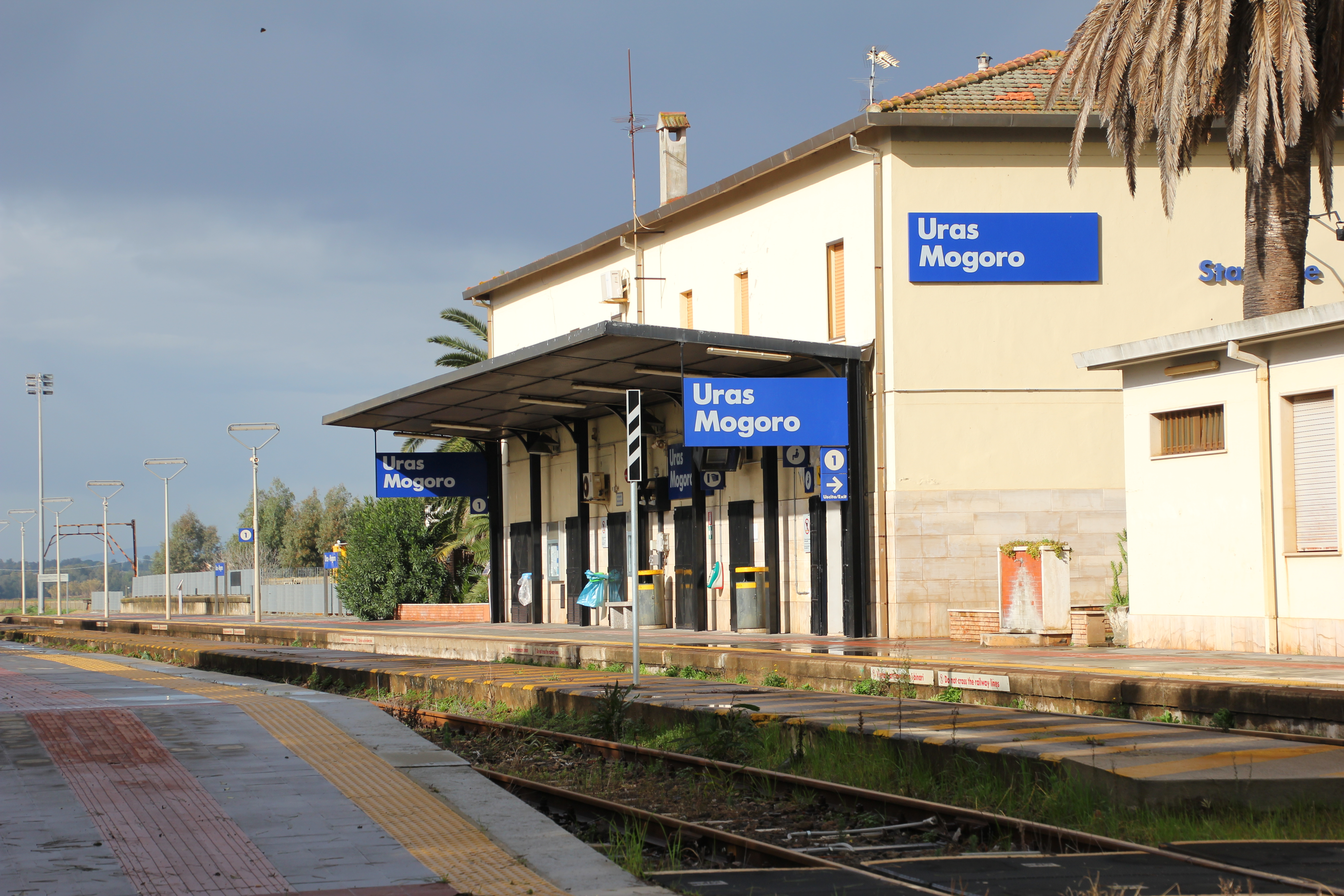 Uras - Stazione ferroviaria di Uras-Mogoro